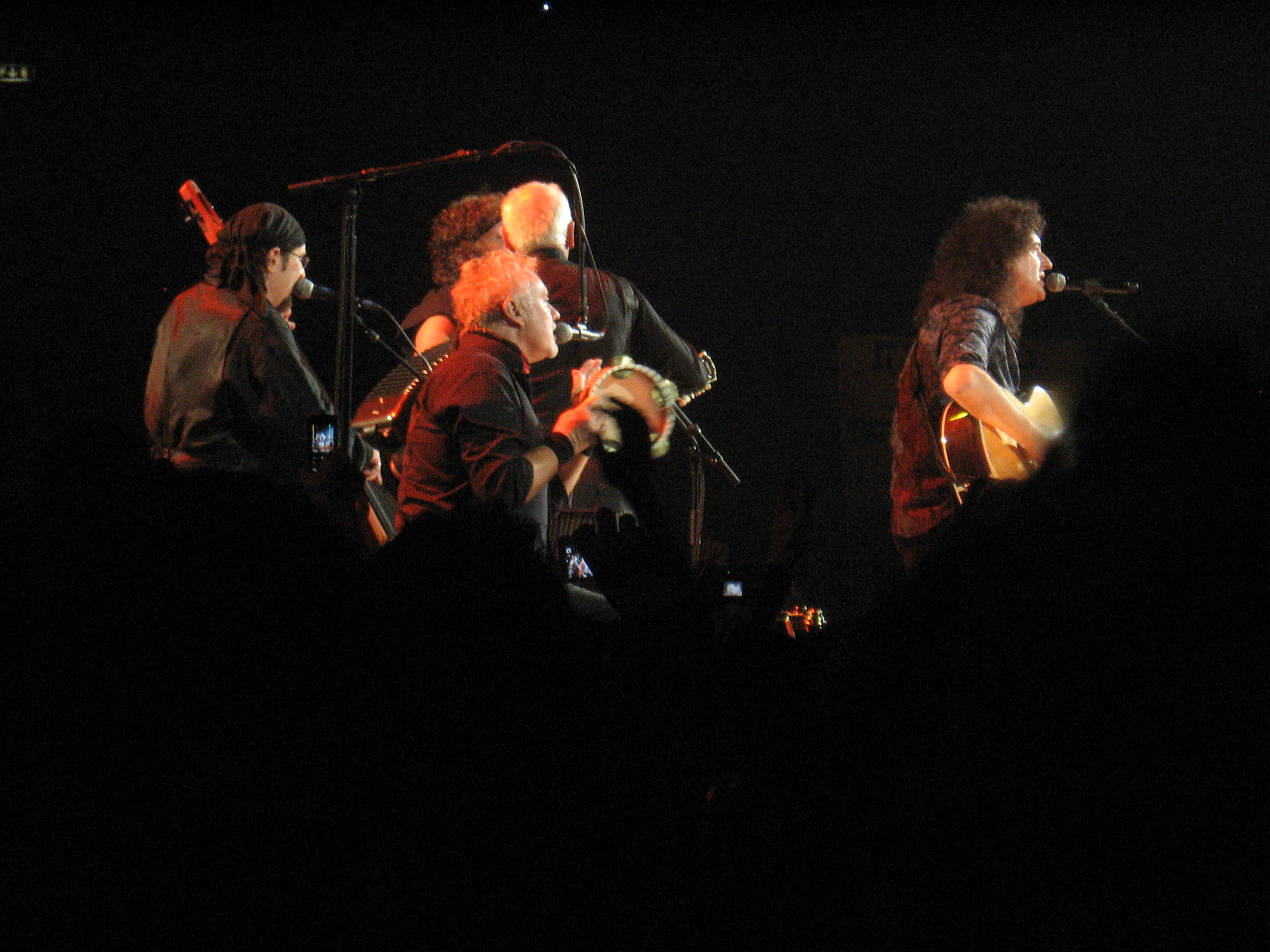 I Queen + Paul Rodgers eseguono '39 al Palalottomatica il 26 settembre 2008